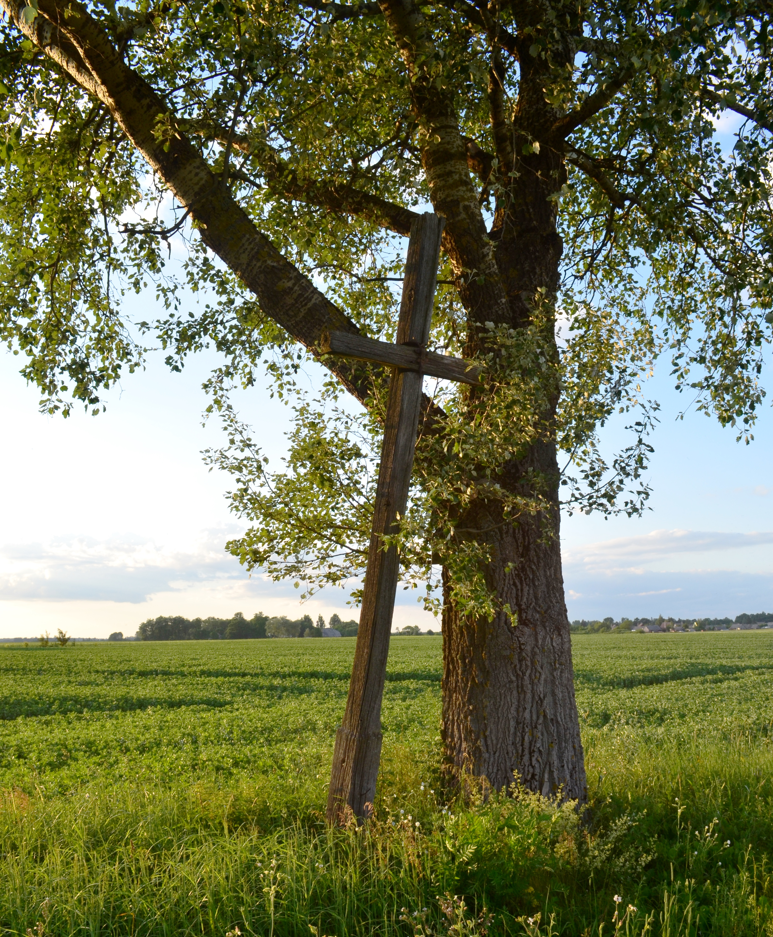 Kryžius, Meškučiai, Ukmergės r.